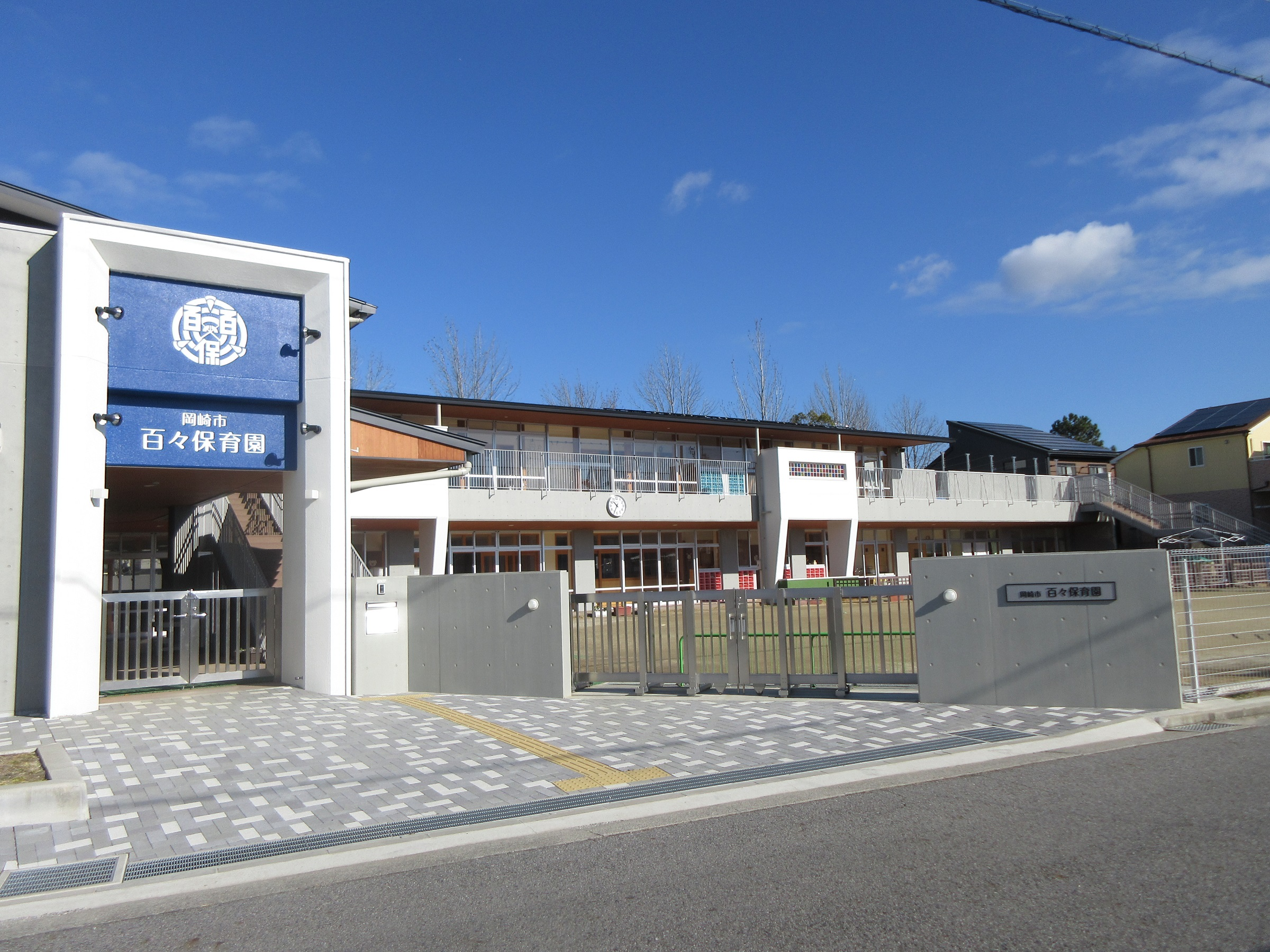 岡崎市百々保育園（岡崎市河原町）